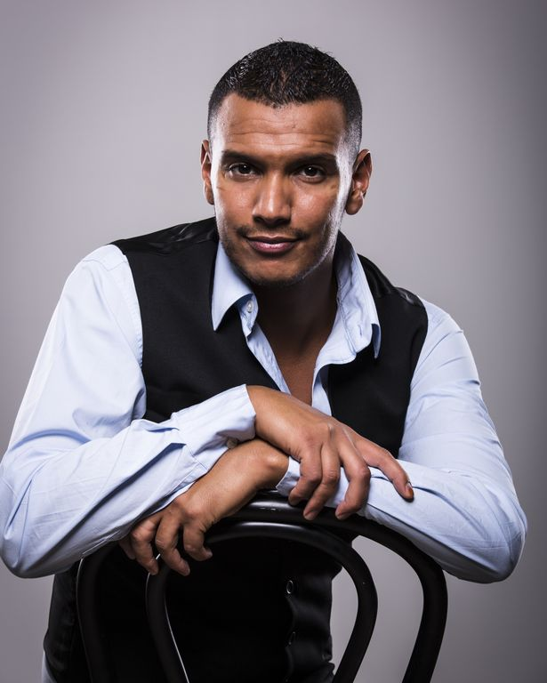 Said Legue, Foto: Ted Olsson